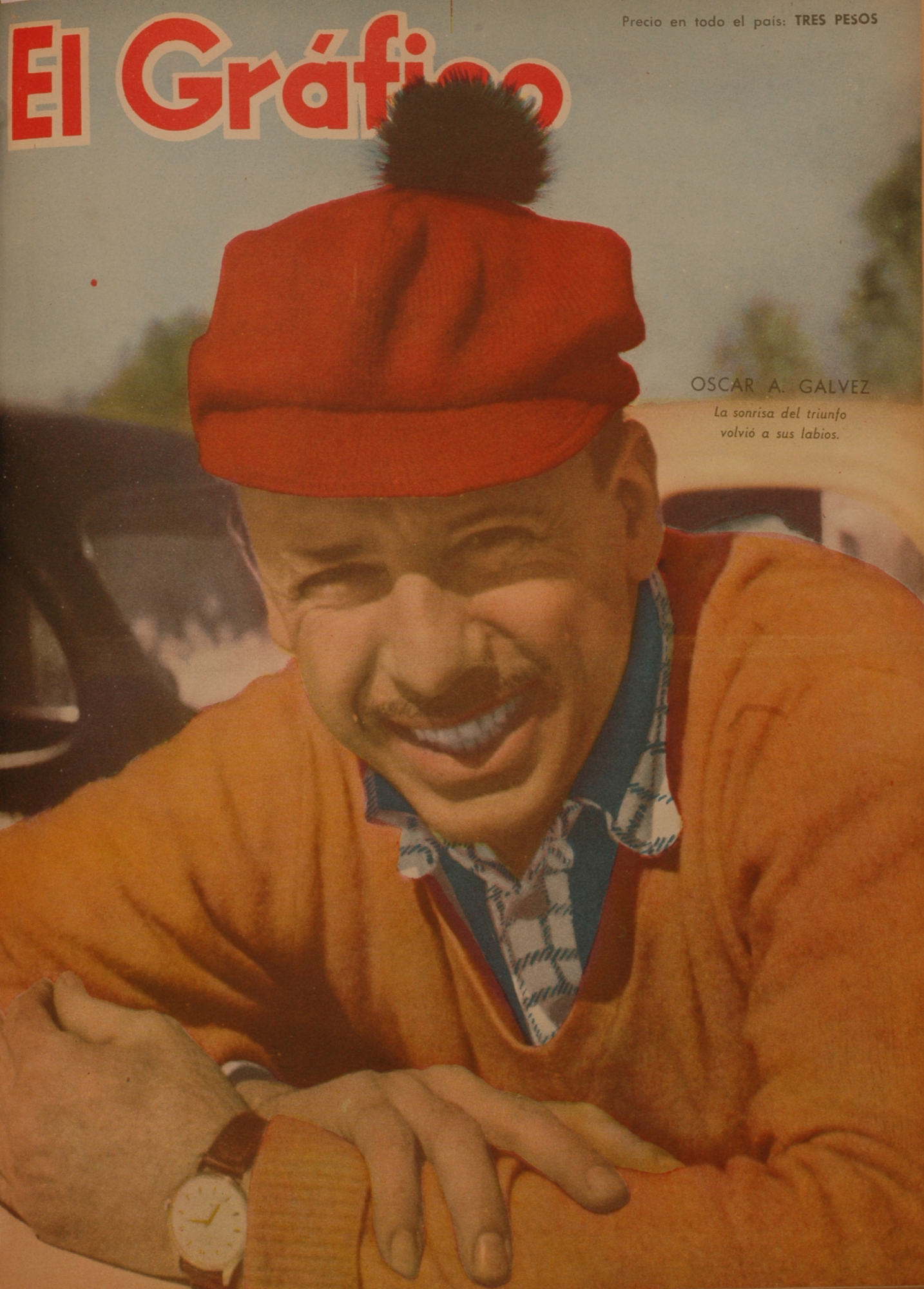 El Grafico del 10 de Octubre de 1958. Edicion 2039